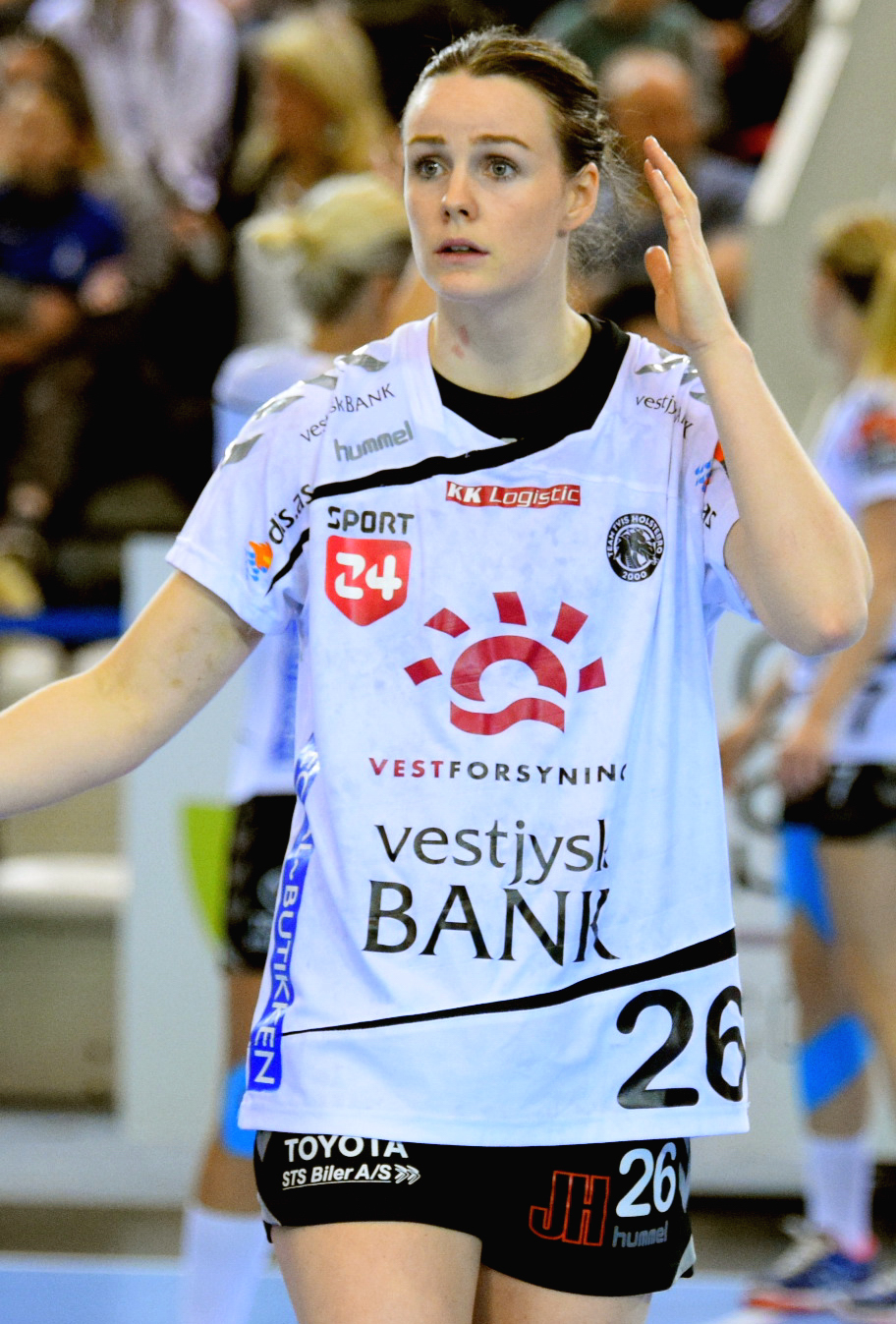 Annette Jensen Le 03 avril 2016 lors du match aller de demi-finale de la Coupe des vainqueurs de coupe de handball Issy Paris Hand / Team Tvis Holstebro